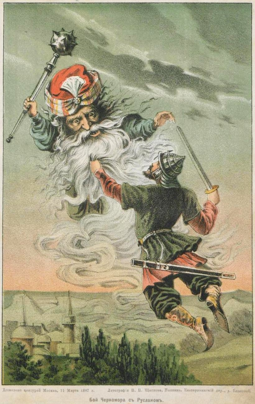 Бой Черномора с Русланом. Москва. Литография П. П. Щеглова. 1887